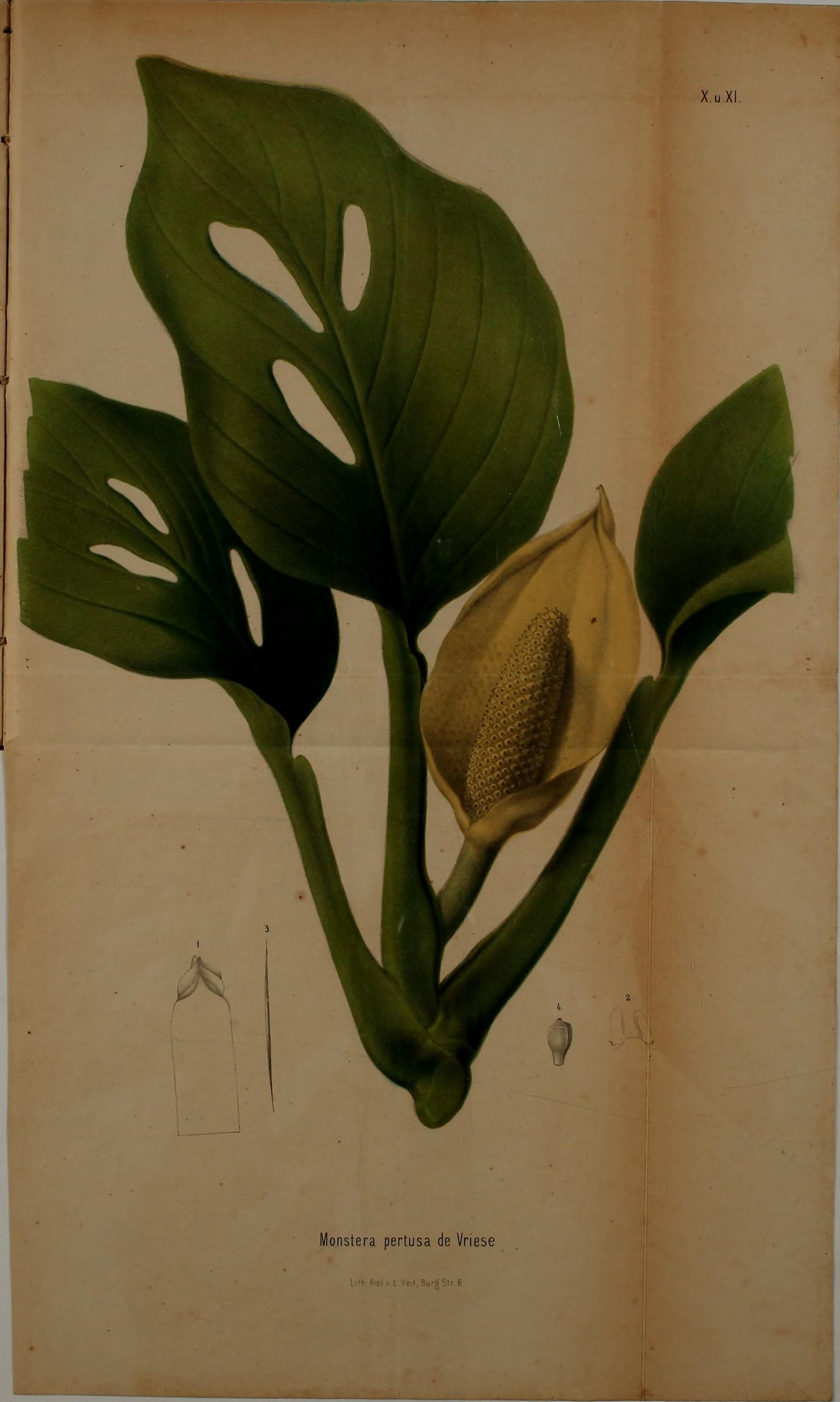 Monstera pertusa, syn. Monstera adansonii